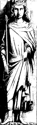 Gisant de Louis III de France (c.863/65 - 882)